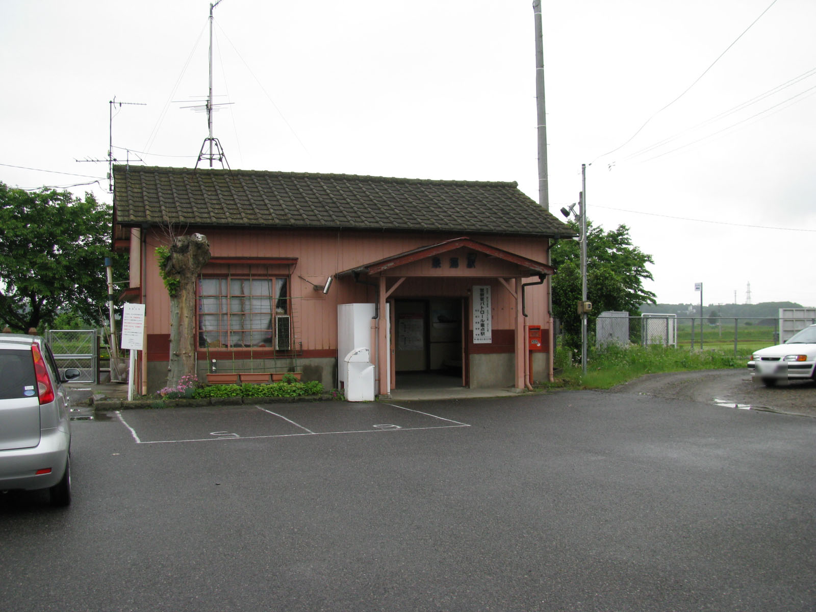 水郡線泉郷駅